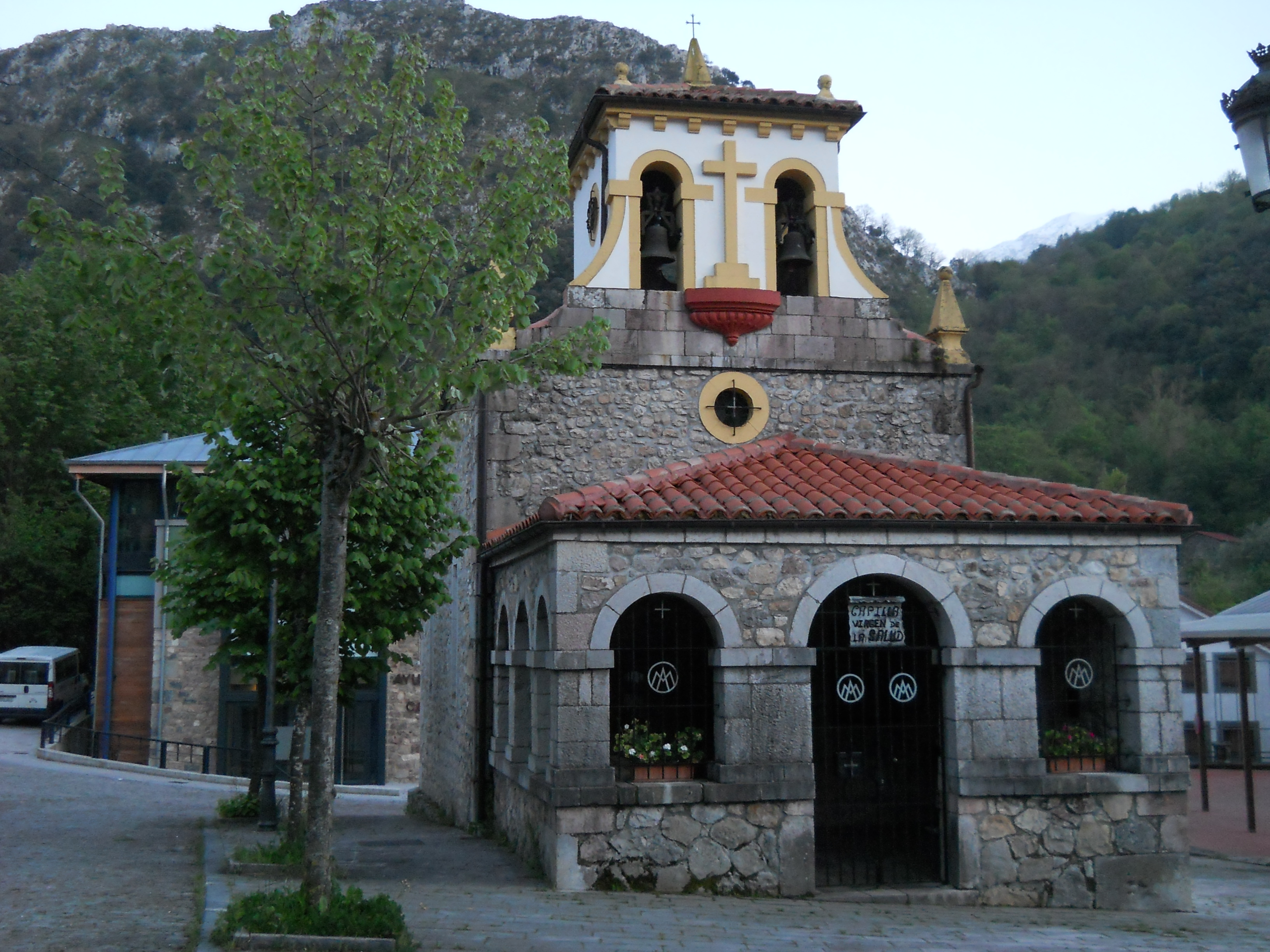 Cappella della Madonna della Salute, Carreña, Cabrales, Asturie, Spagna